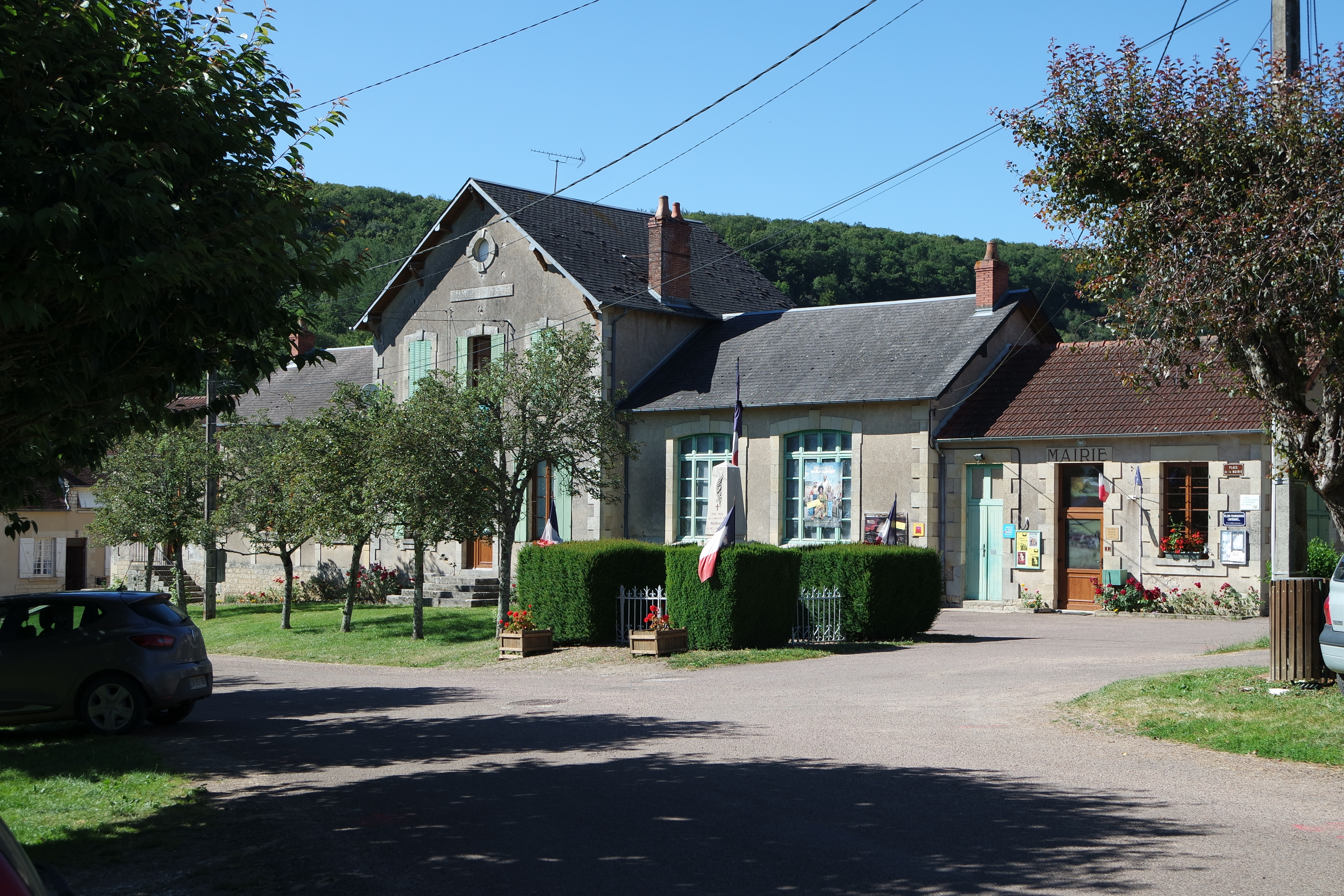 Le monument aux morts de Nannay, pavoisé, le dimanche 17 juillet 2016. Le drapeau au sommet du monument est noué avec une cravate noire pour marquer le deuil de l'attentat du 14 juillet 2016 à Nice. En arrière plan la mairie de Nannay, Nièvre, France.